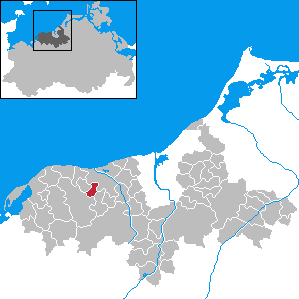 Reddelich in Mecklenburg-Western Pomerania - District Bad Doberan